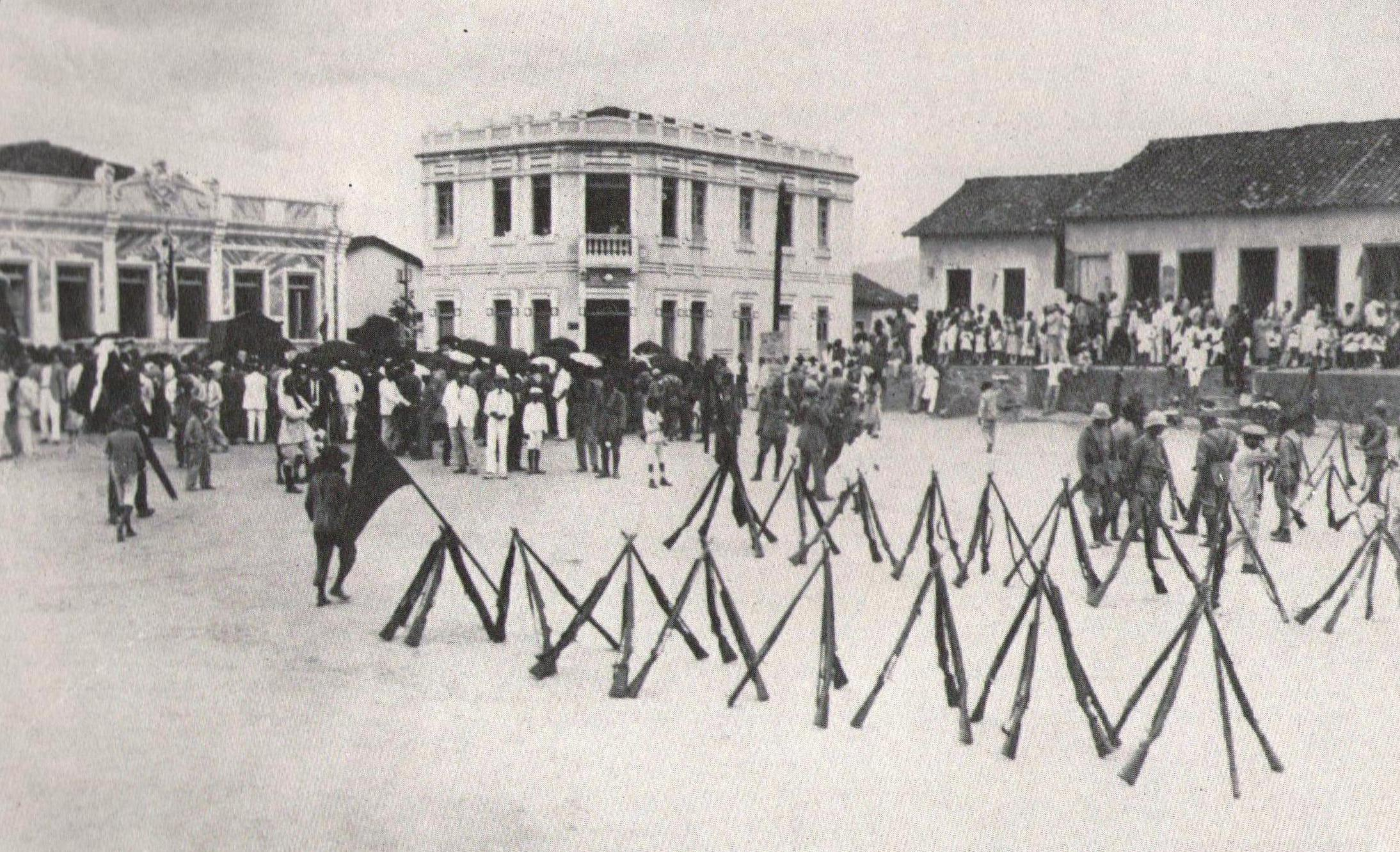 Missa campal realizada na Praça Ruy Barbosa, em 15 de novembro de 1930, durante o período da Revolução.